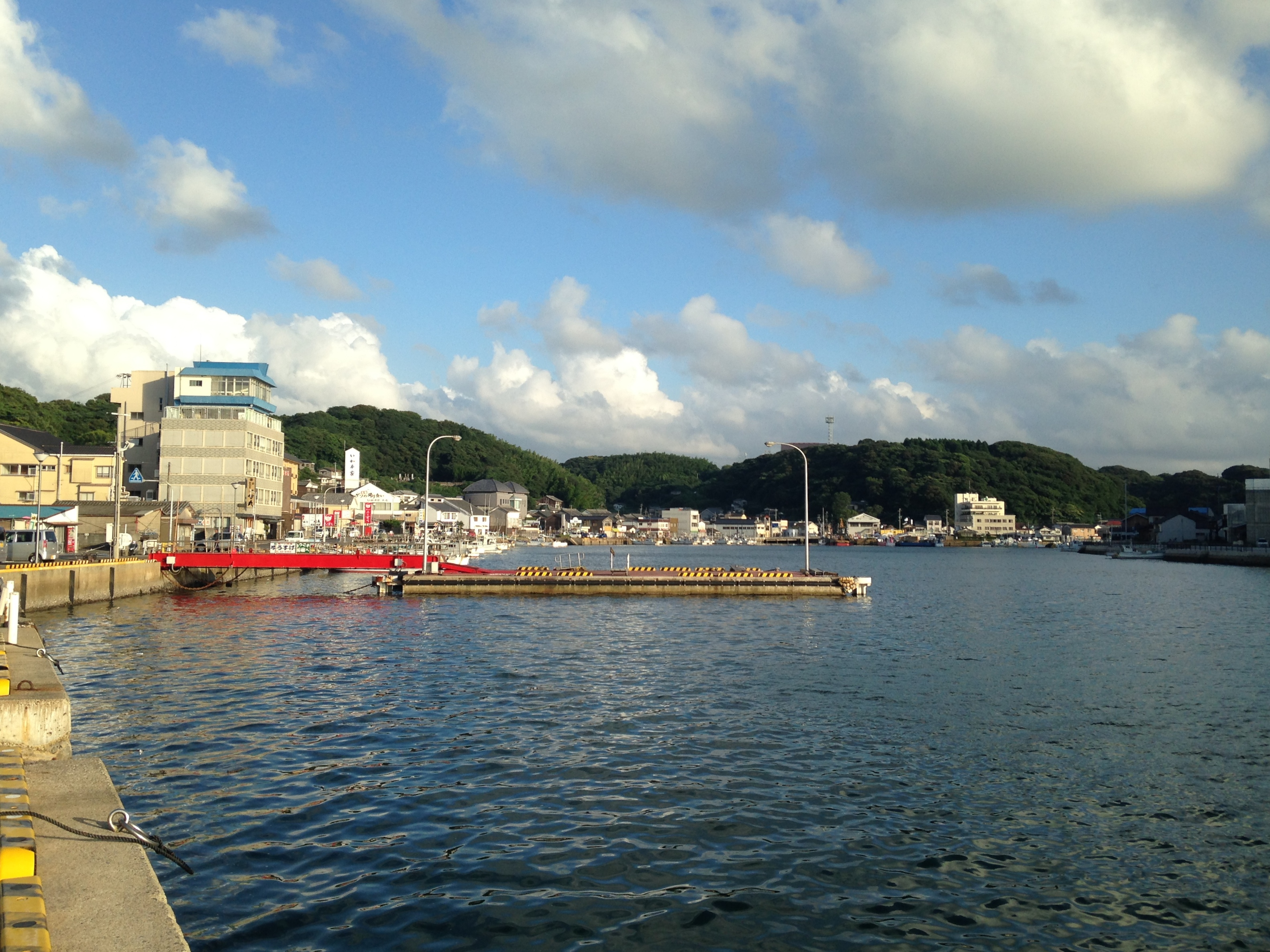 呼子漁港の遠景